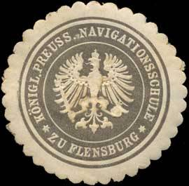 Sealing stamp Title: Königl. Preuss. Navigationsschule zu Flensburg Description: grau, weiß, geprägt Place: Flensburg size: 4 cm